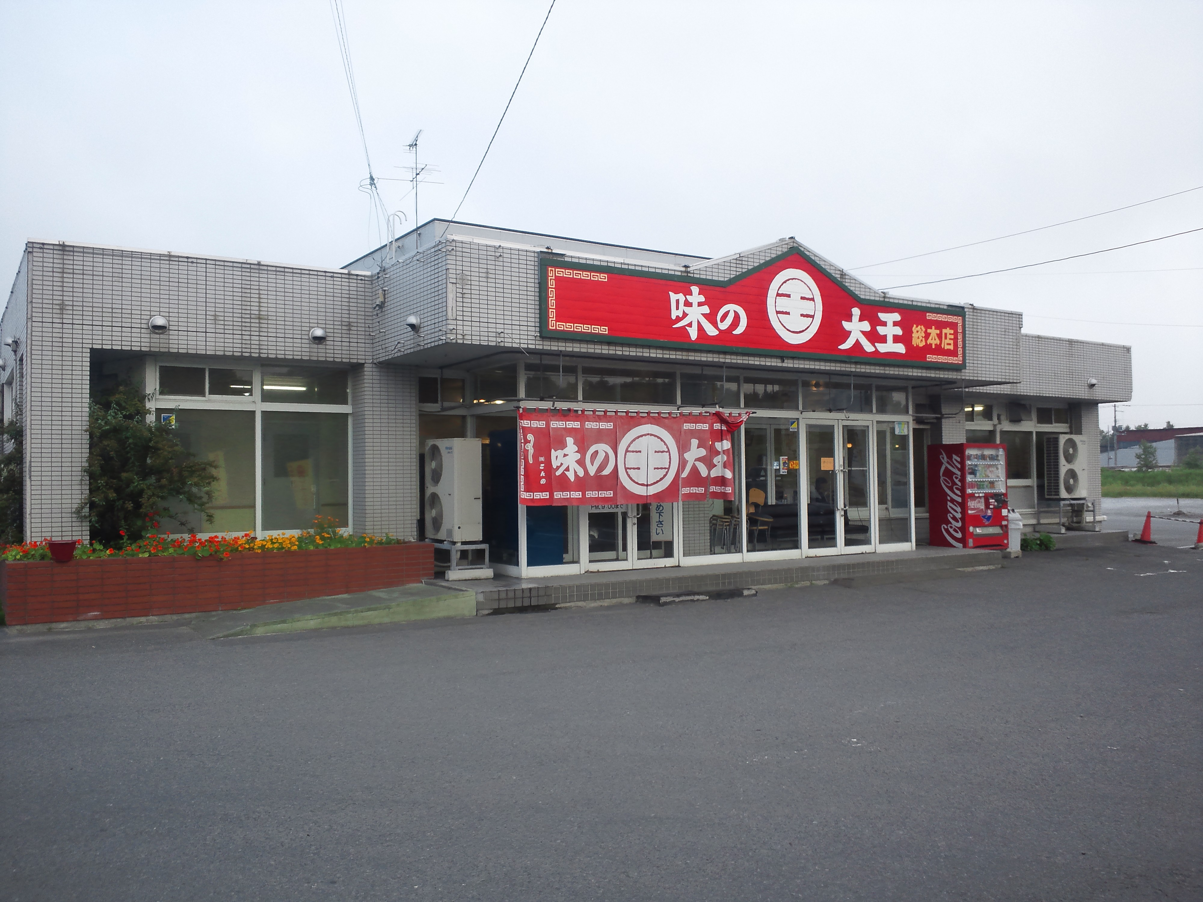 北海道苫小牧市のラーメン店。味の大王総本店